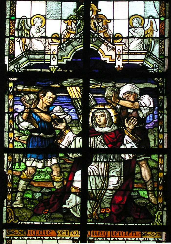 Trittenheim an der Mosel, Bleiglasfenster im Nazarenerstil (1923) in der katholischen Pfarrkirche "St. Clemens" Matthäus 5,10 Selig, die um der Gerechtigkeit willen verfolgt werden; denn ihnen gehört das Himmelreich. Aus den Jahren 1920/21 stammen die größtenteils noch originalen neoromanisch gehaltenen Glasfenster der Firmen Binsfeld-Dornoff (Trier; 3., 5., 7. und 8. Seligpreisung)